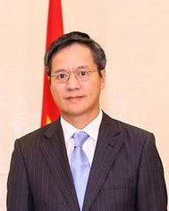 Pham Vinh Quang